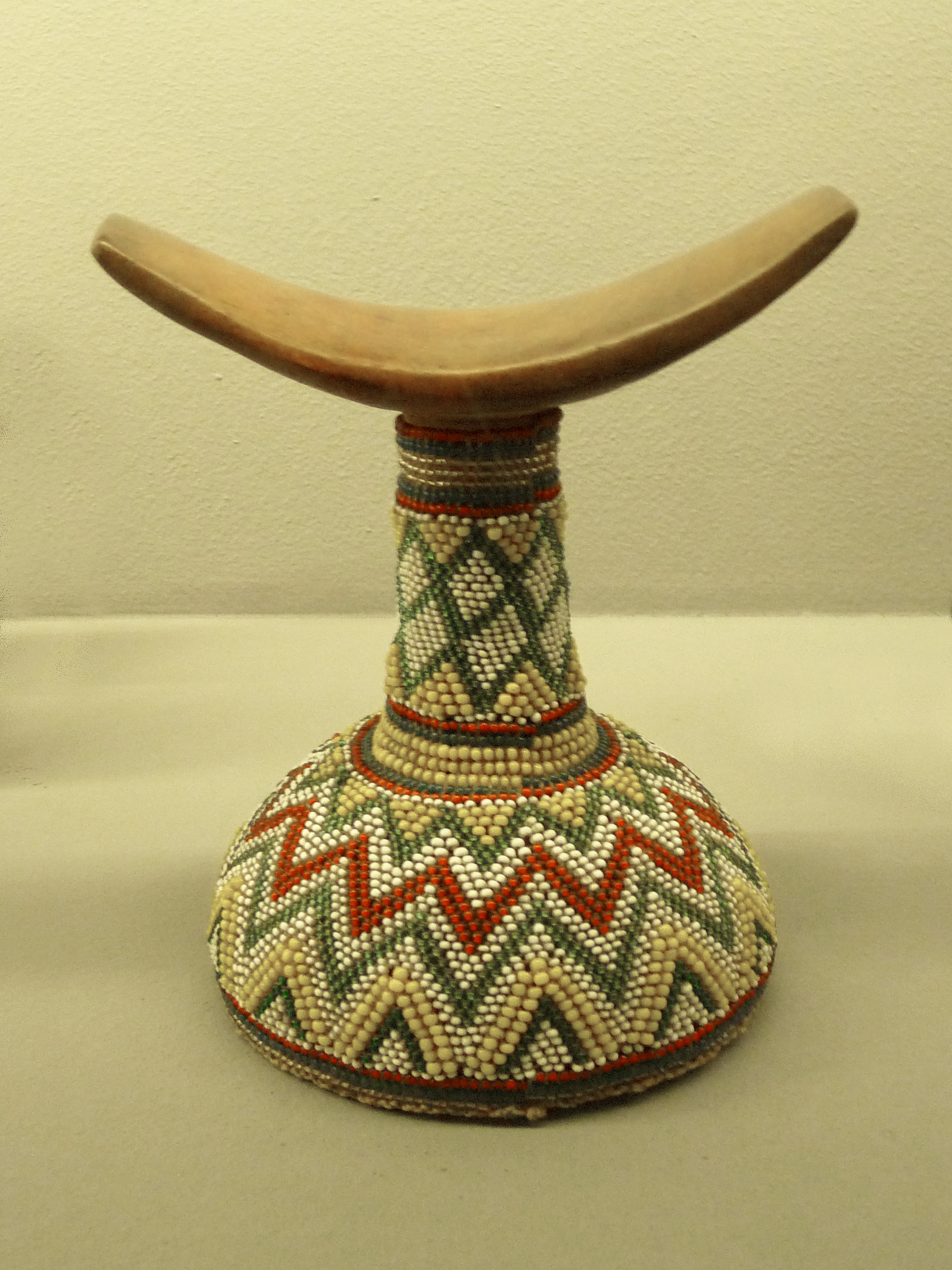 Appui-tête, population Jimma, Ethiopie, 19e siècle. Bois, perles. Musée du quai Branly.